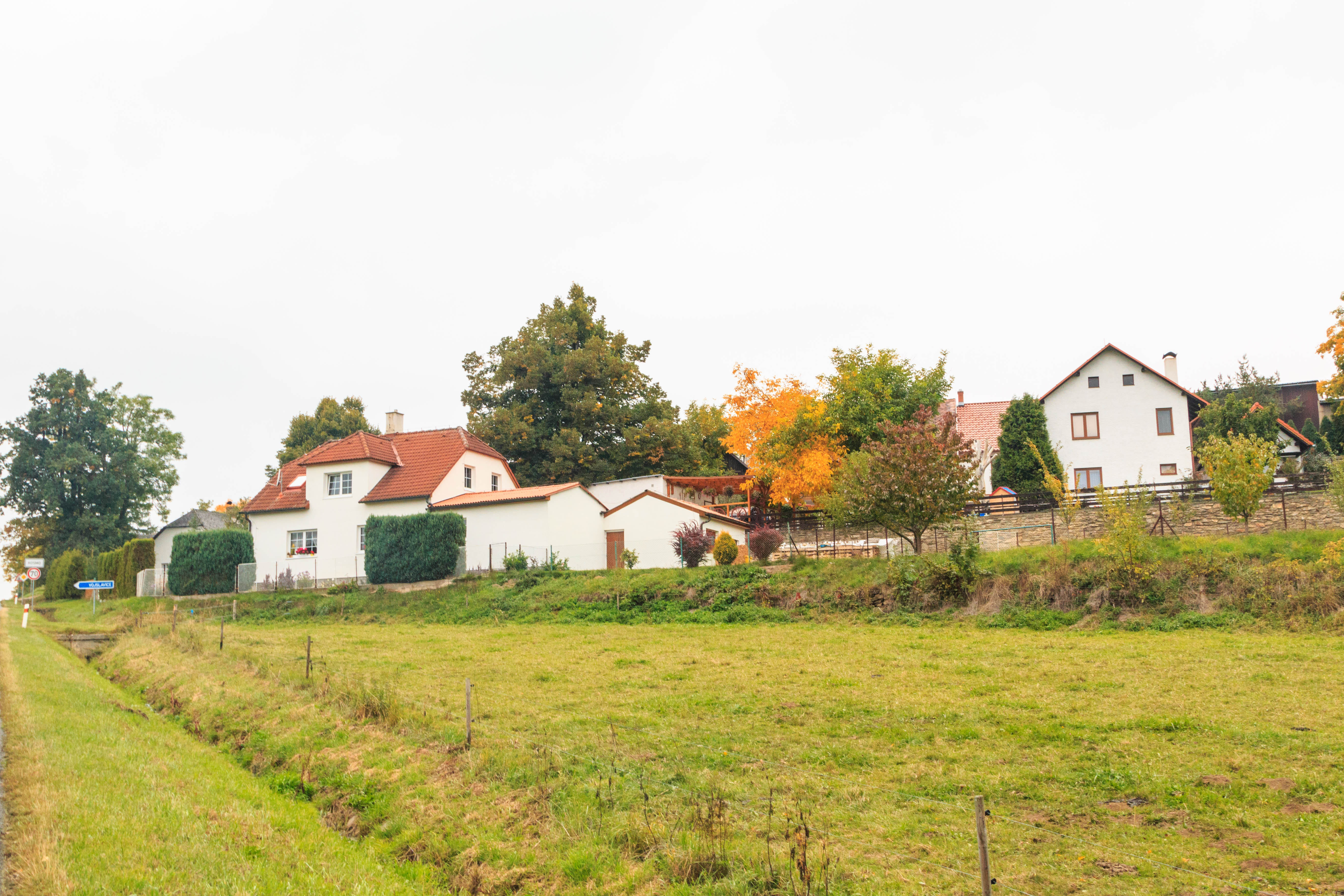 Kosmo čp. 9